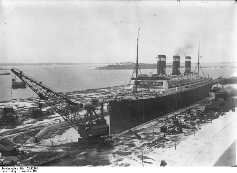 Der grösste Passagierdampfer der Welt die "Leviathan" der United States Lines wird wegen der schlechten wirtschaftlichen Lage im Passagierverkehr im Nord-Atlantik vorläufig ausser Dienst gestellt. Der Dampfer "Leviathan", die frühere deutsche "Vaterland" im Dock.